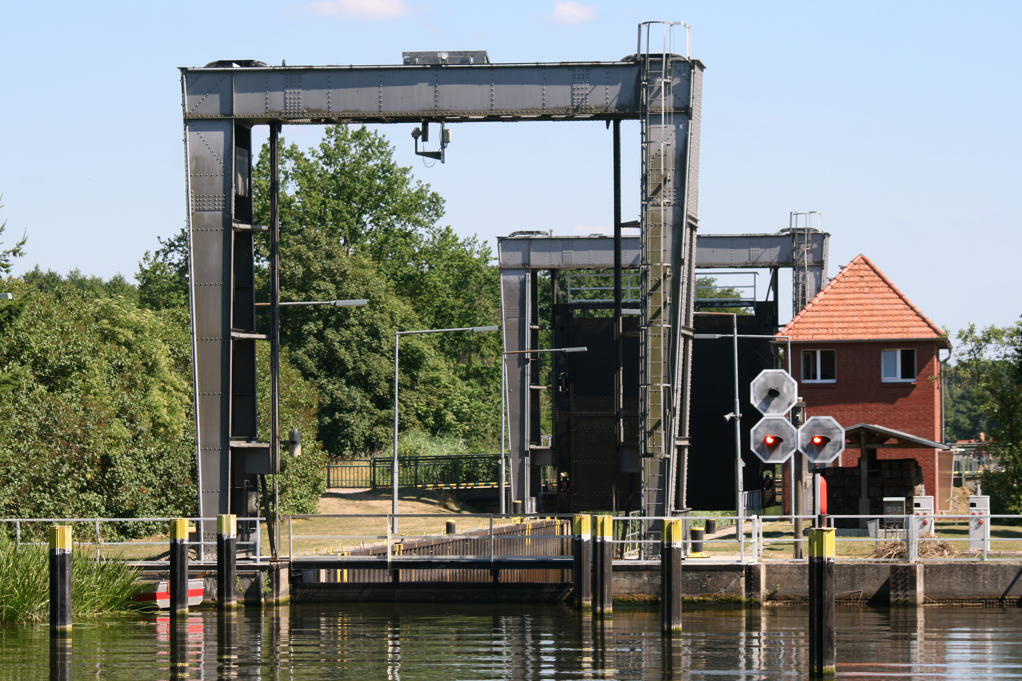 Schleuse Mirow in Mecklenburg-Vorpommern, Tor zum Unterwasser geöffnet